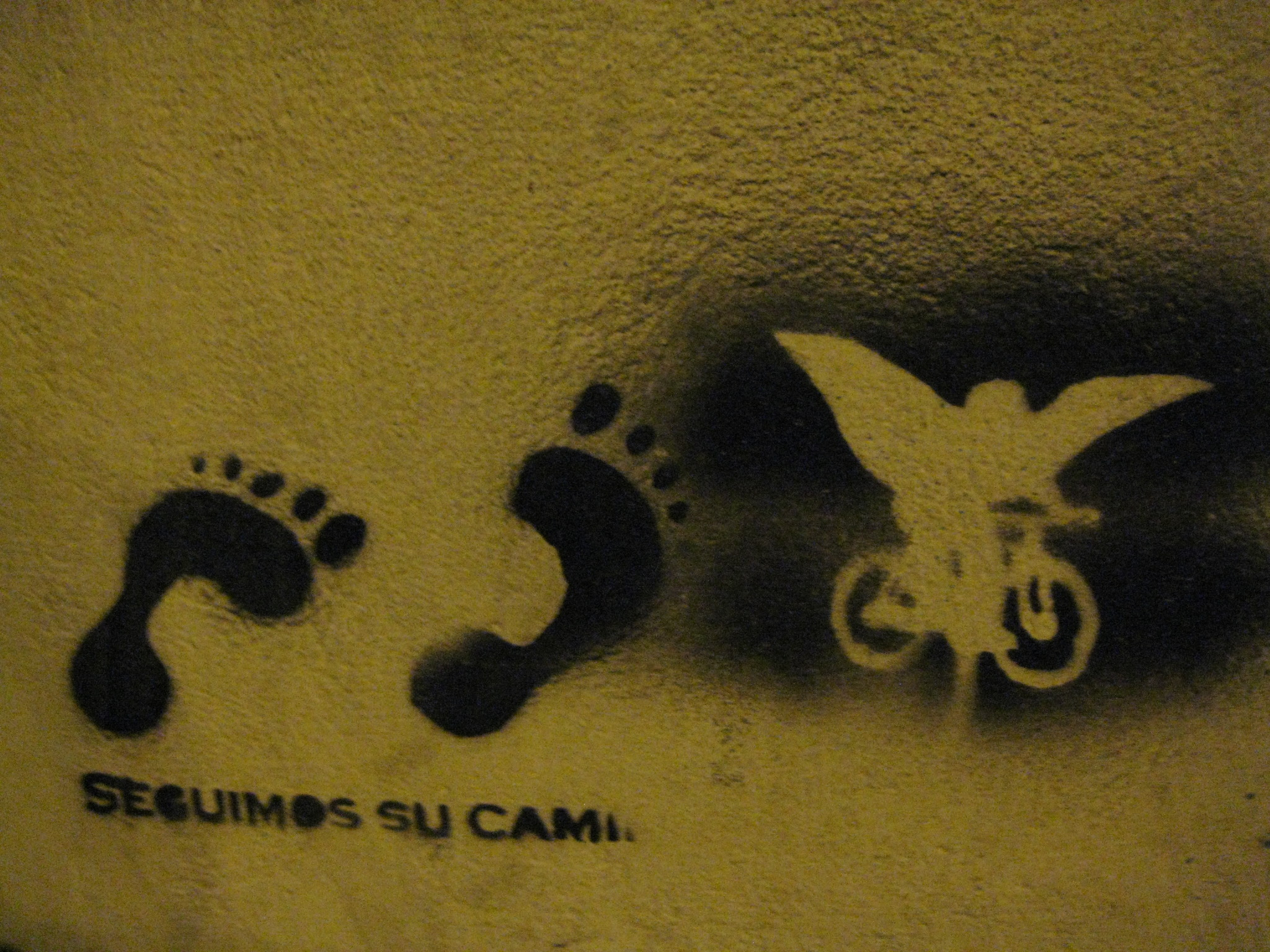 imagen en la calle de pocho